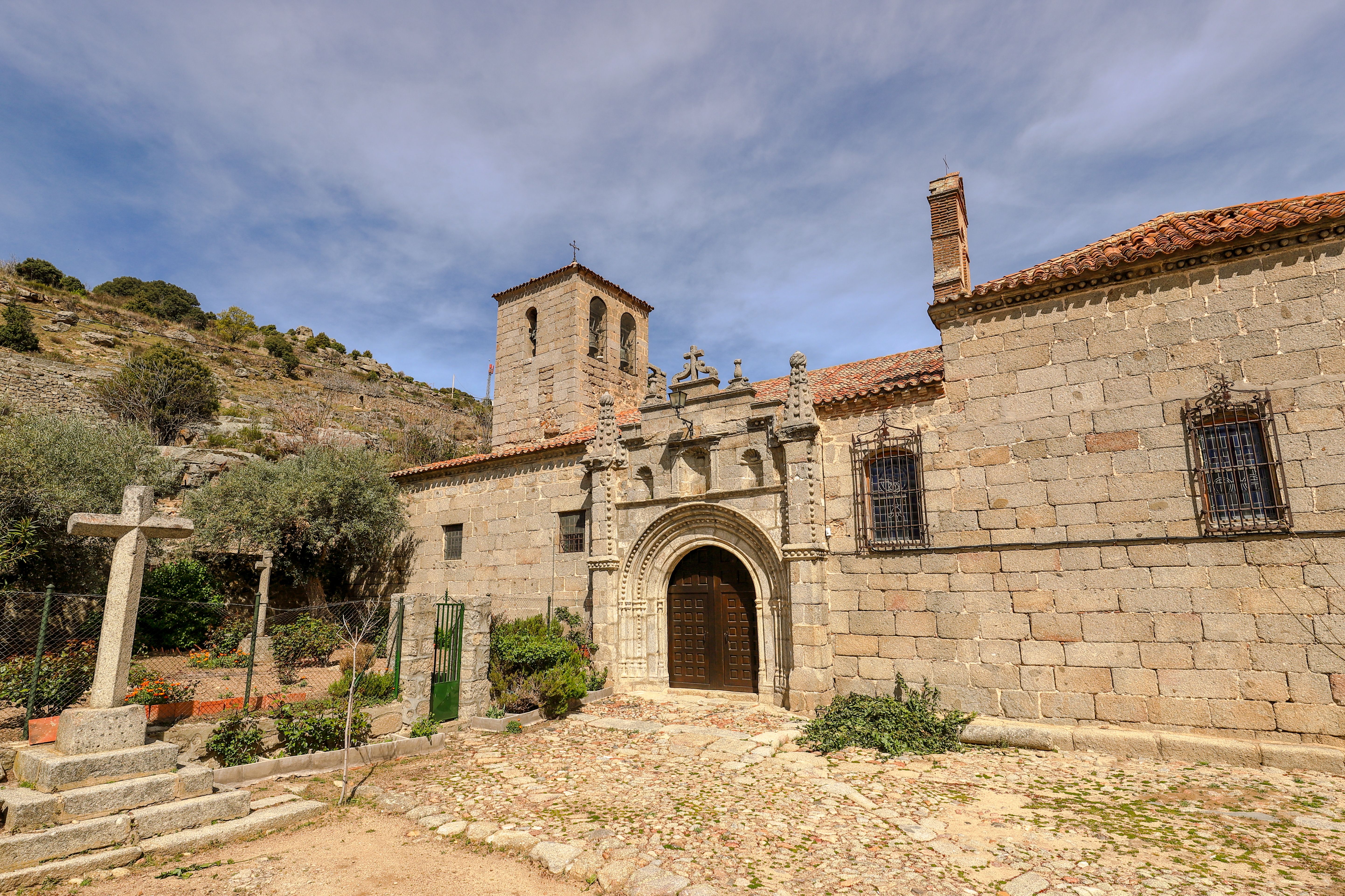 Herradón de Pinares es un municipio de la comarca de Ávila, en la provincia de Ávila.